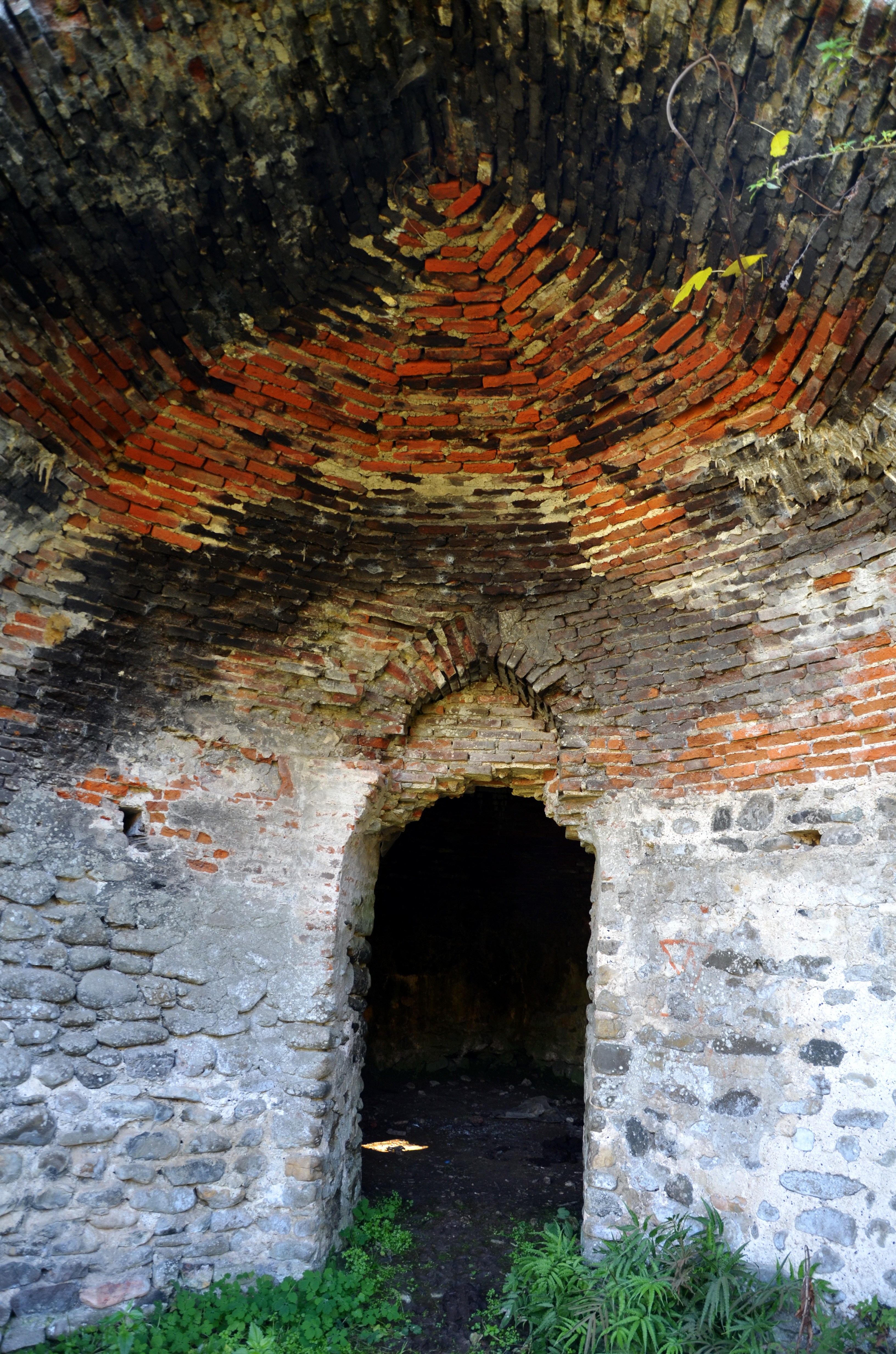 Siyahkal - Deylaman Caravanserai - Titi